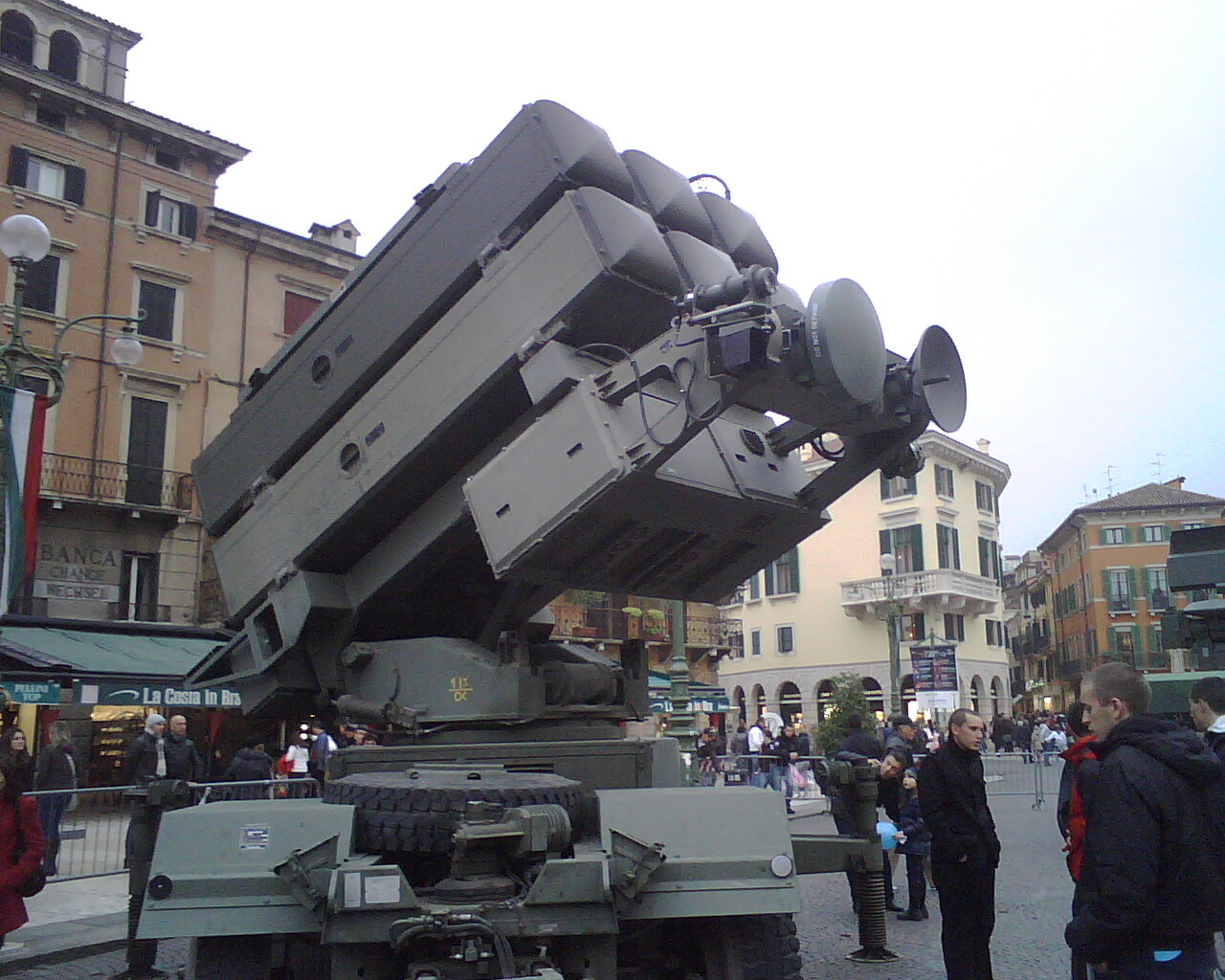 L'immagine rappresenta una batteria missilistica antiaerea italiana esposta a verona durante una celebrazione organizzata dall'esercito italiano.